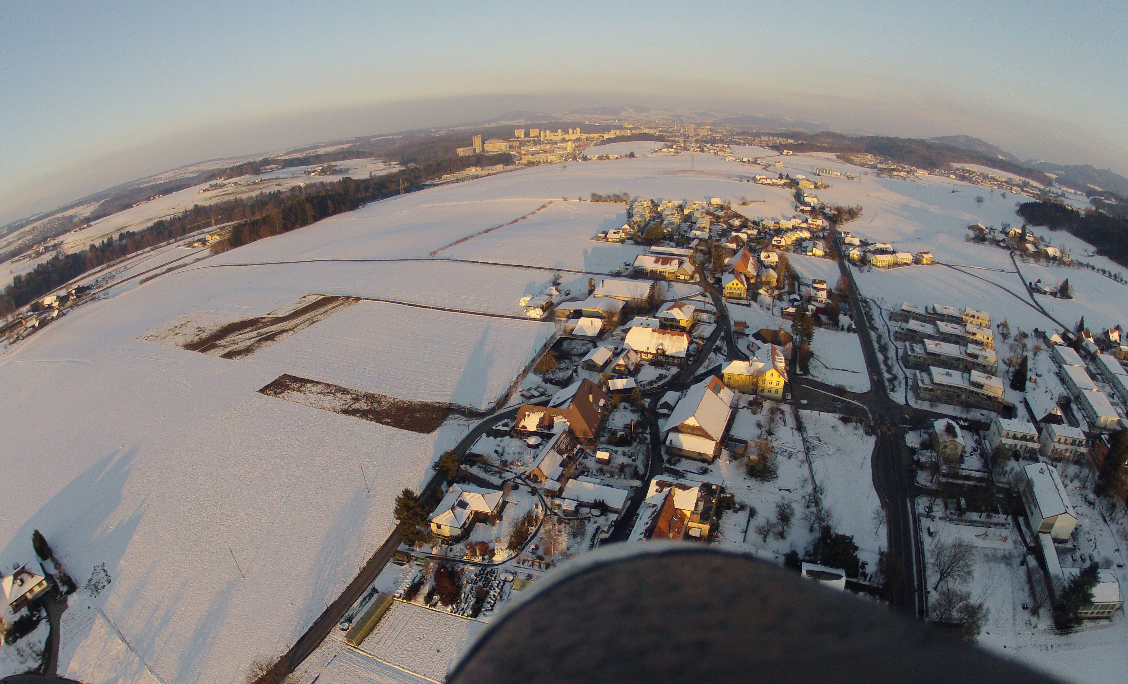 Oberbottigen von Westen mit Sicht bis Bern